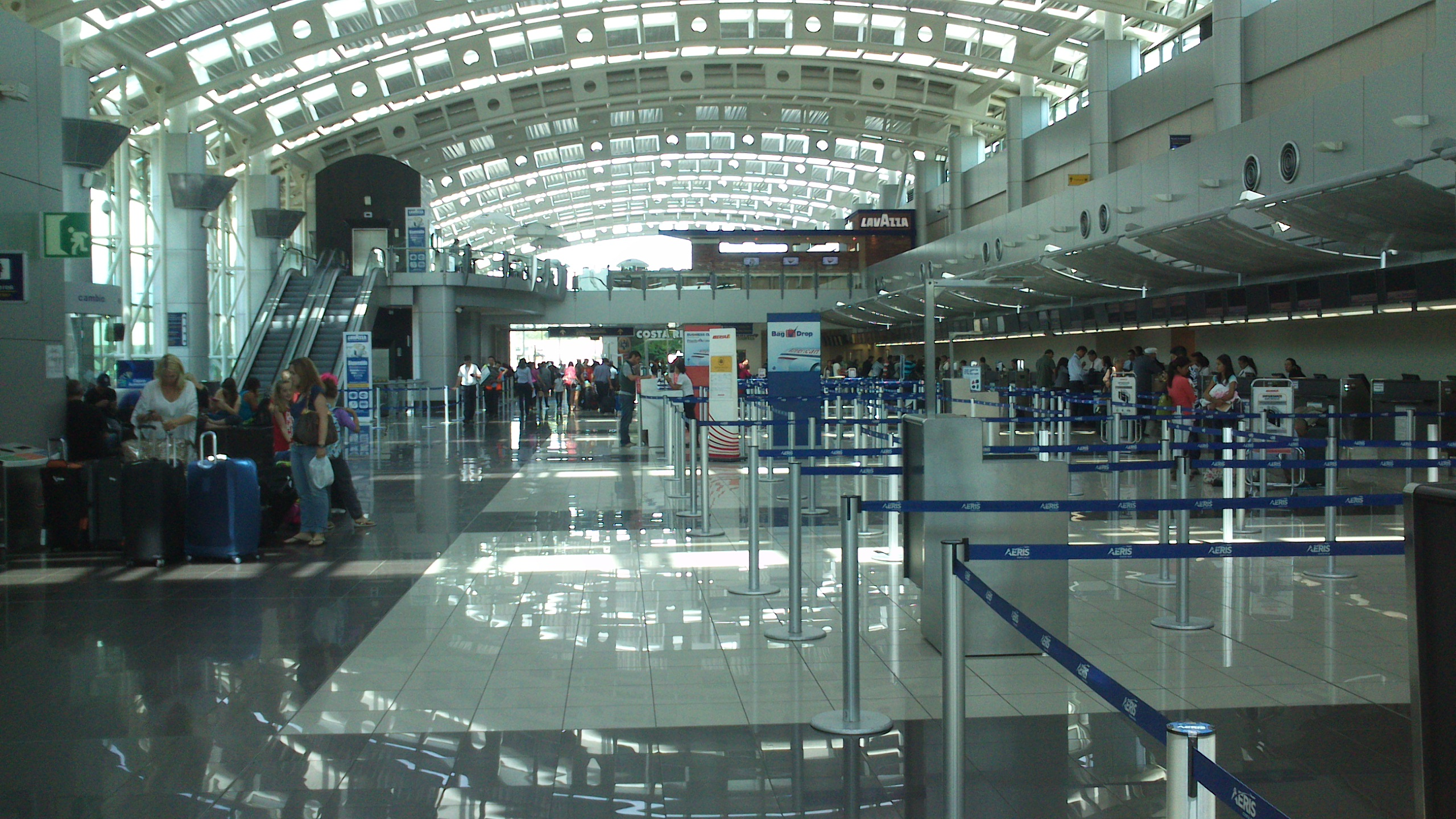 Alajuela, pressi San José (Costa Rica): Aeroporto Internazionale Juan Santamaría. Fonte: opera propria. Data: 03/2013. Autore: Pantar. Licenza: Pubblico dominio